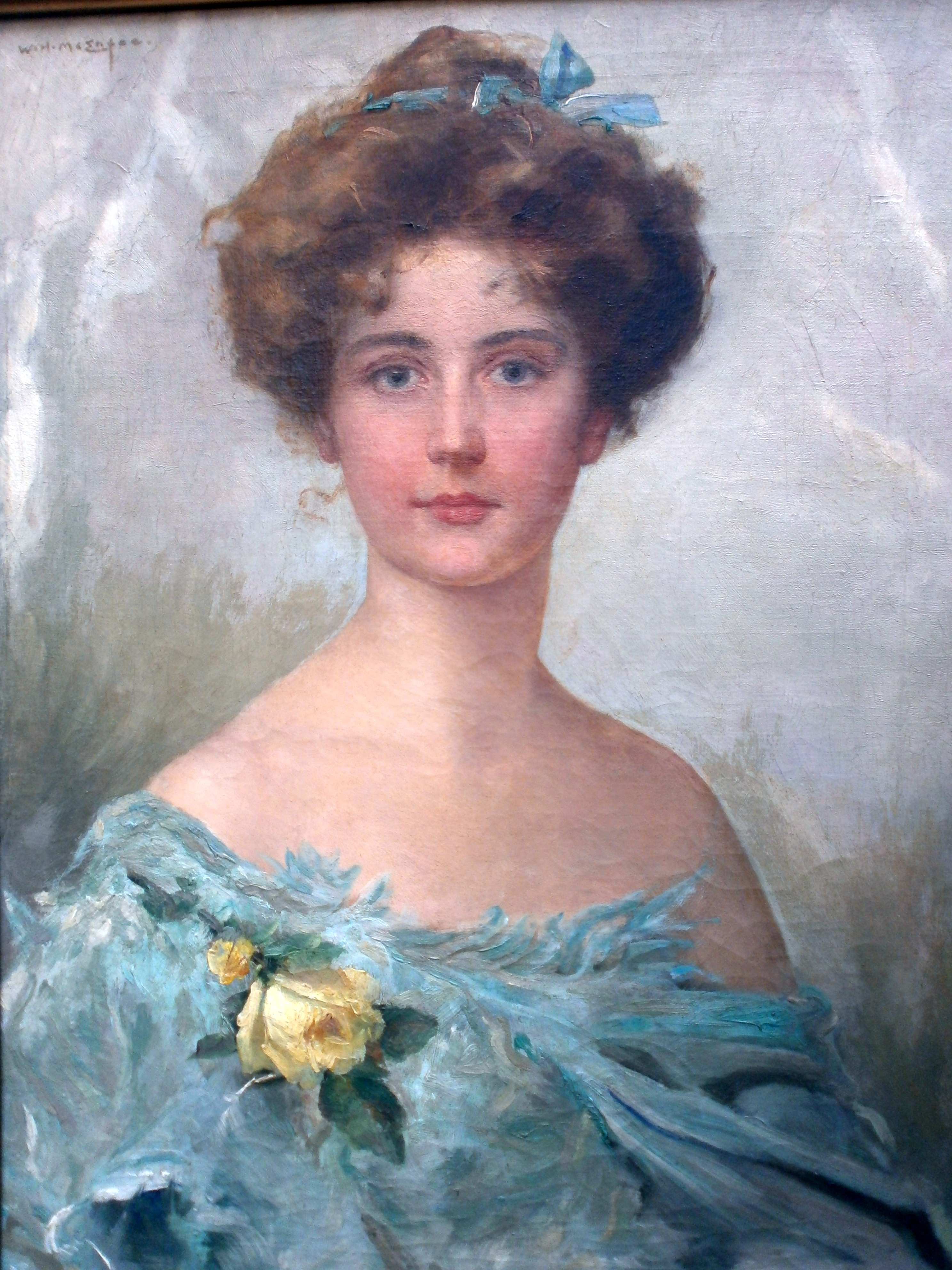 Portrait einer jungen Dame, W.H.McEntee um 1895